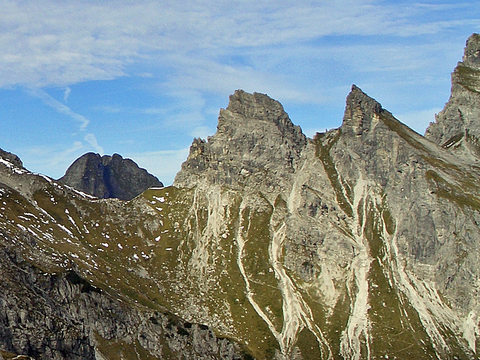 Südliches Höllhorn (2145 m) und Nördliches Höllhorn (2145 m), dahinter die Gipfel der Höfats (2259 m).